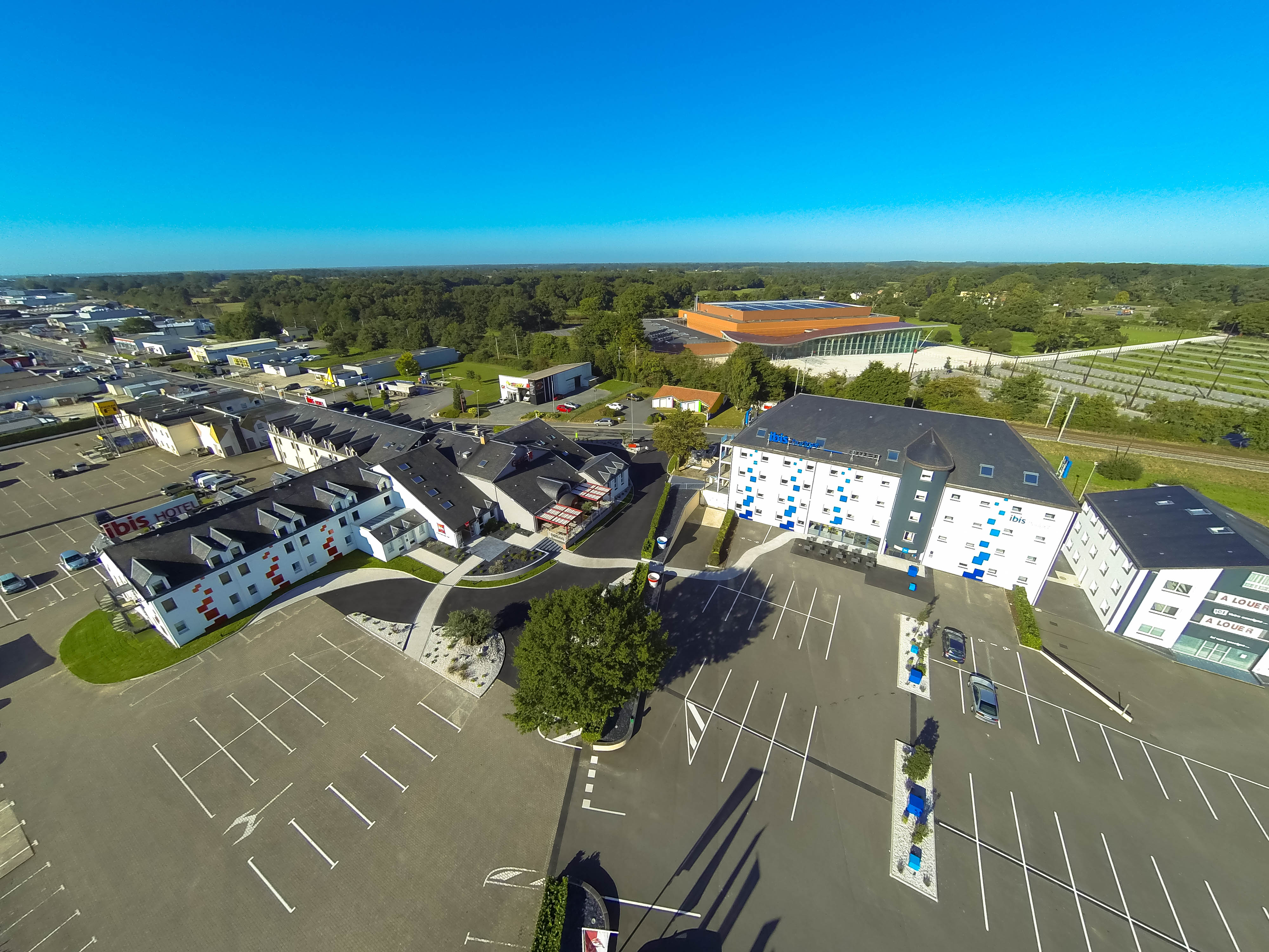 Photo prise par drone du parc hôtelier de la zone Beaupuy avec le Vendéspace en fond.